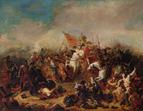 Esquisse préparatoire pour le tableau La Bataille de Hastings de 1844, qui a brûlé en 1905